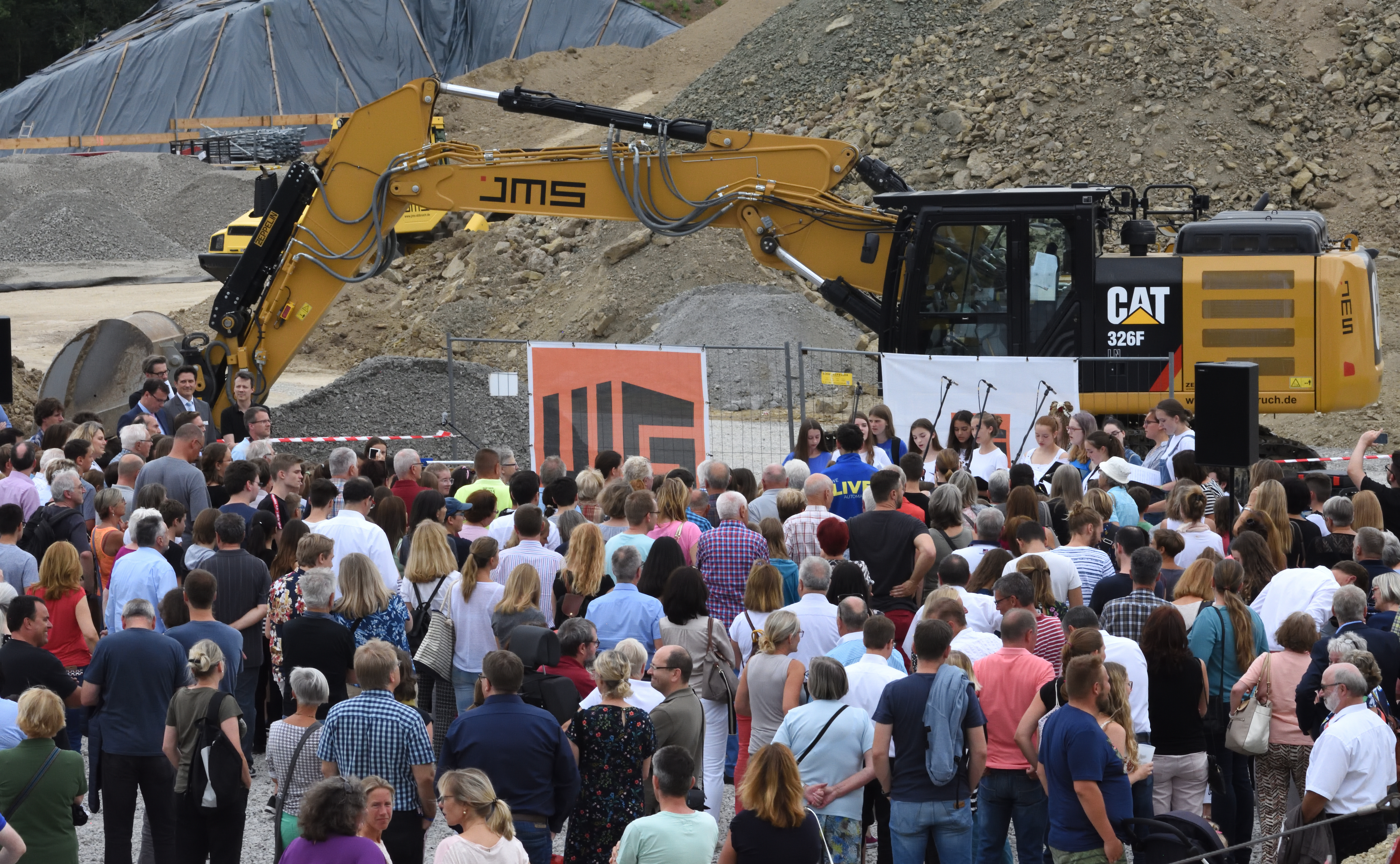 Feier zur Grundsteinlegung des Neubaus der Oscar-Paret-Schule in Freiberg am Neckar, Juli 2019